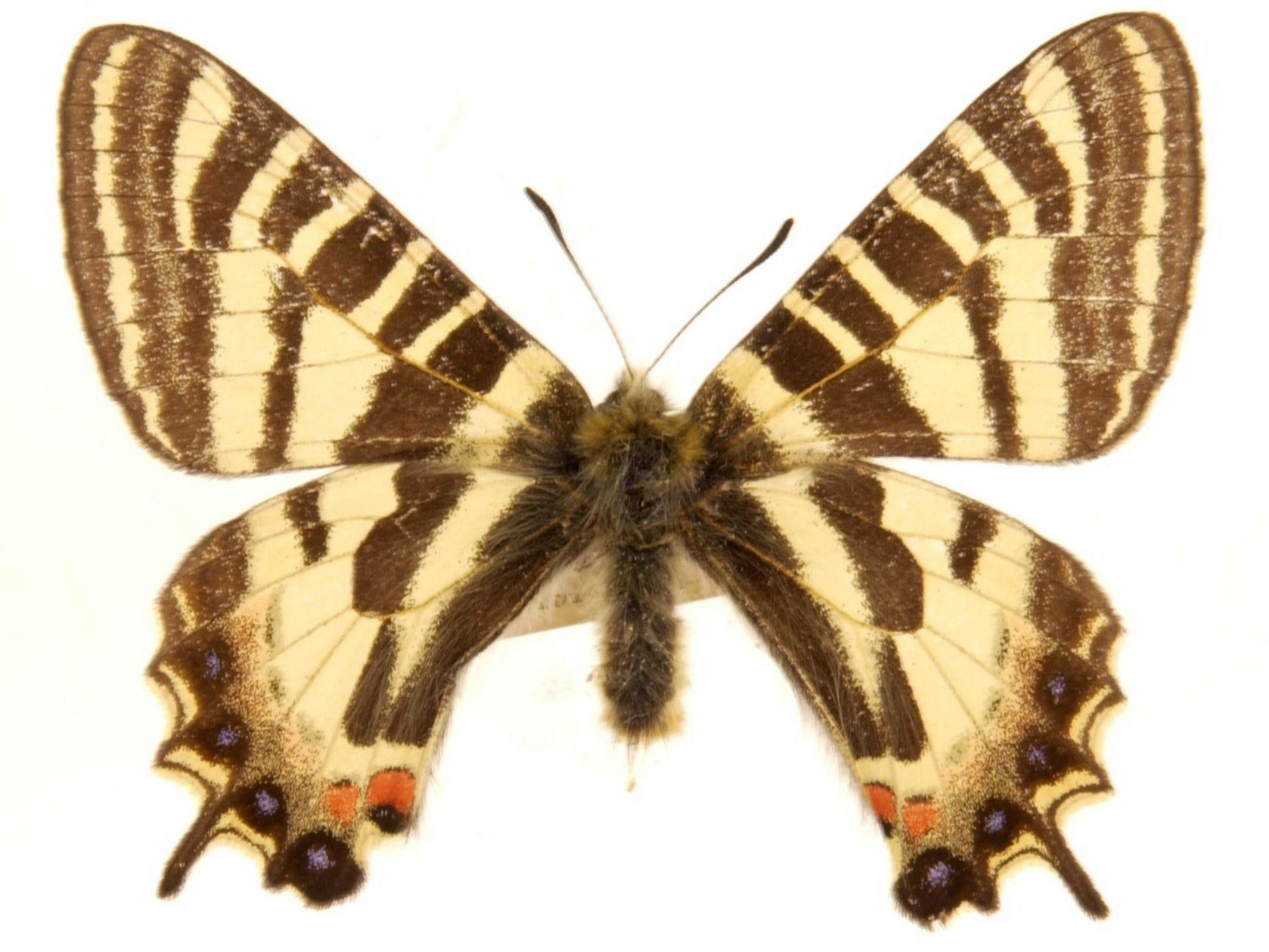 L.chinensis